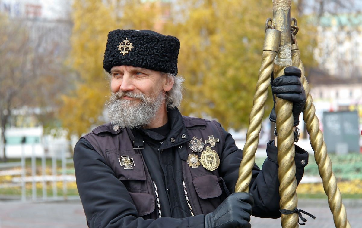 _MG_6381-1.jpg